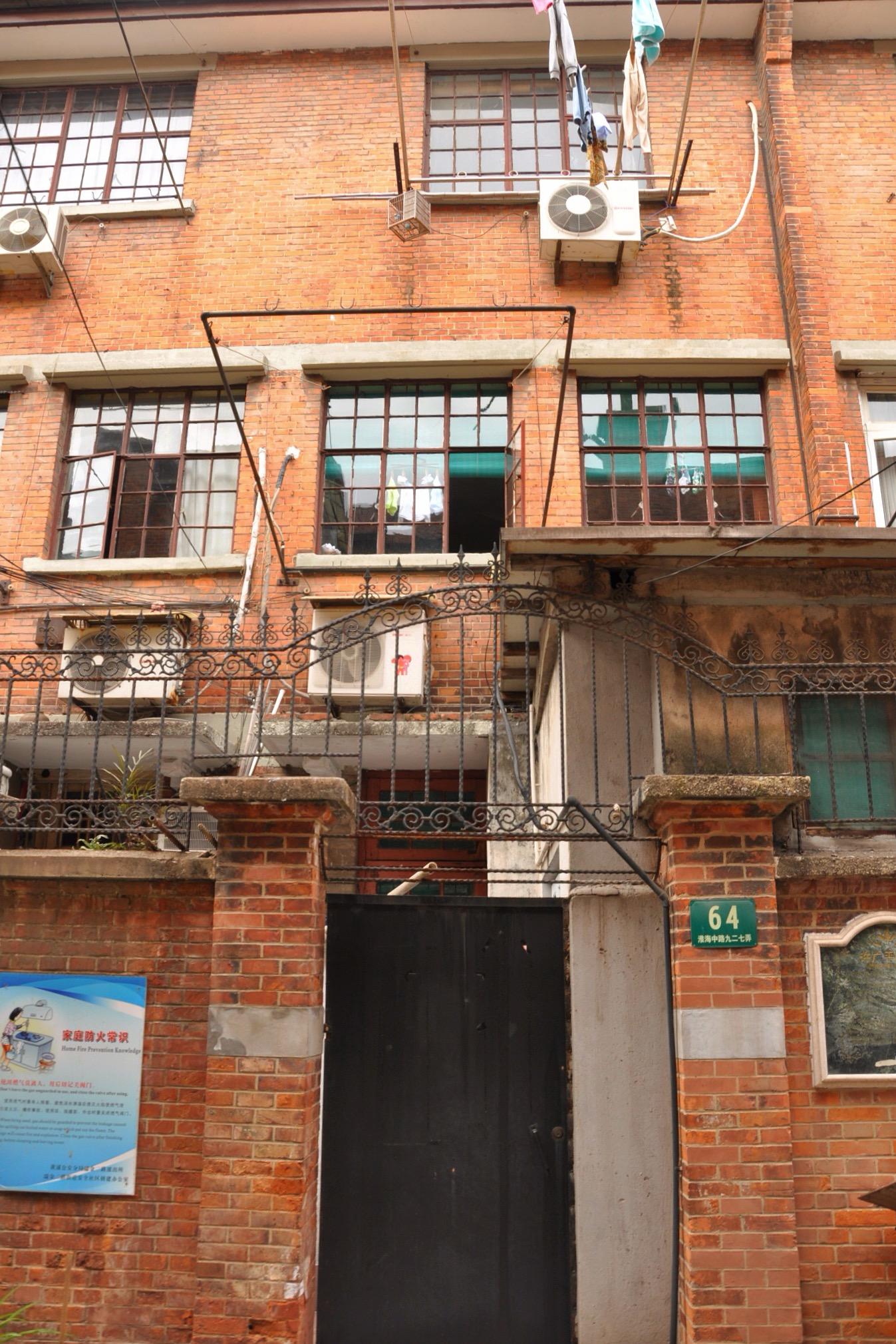 许广平旧居 淮海中路927弄64号